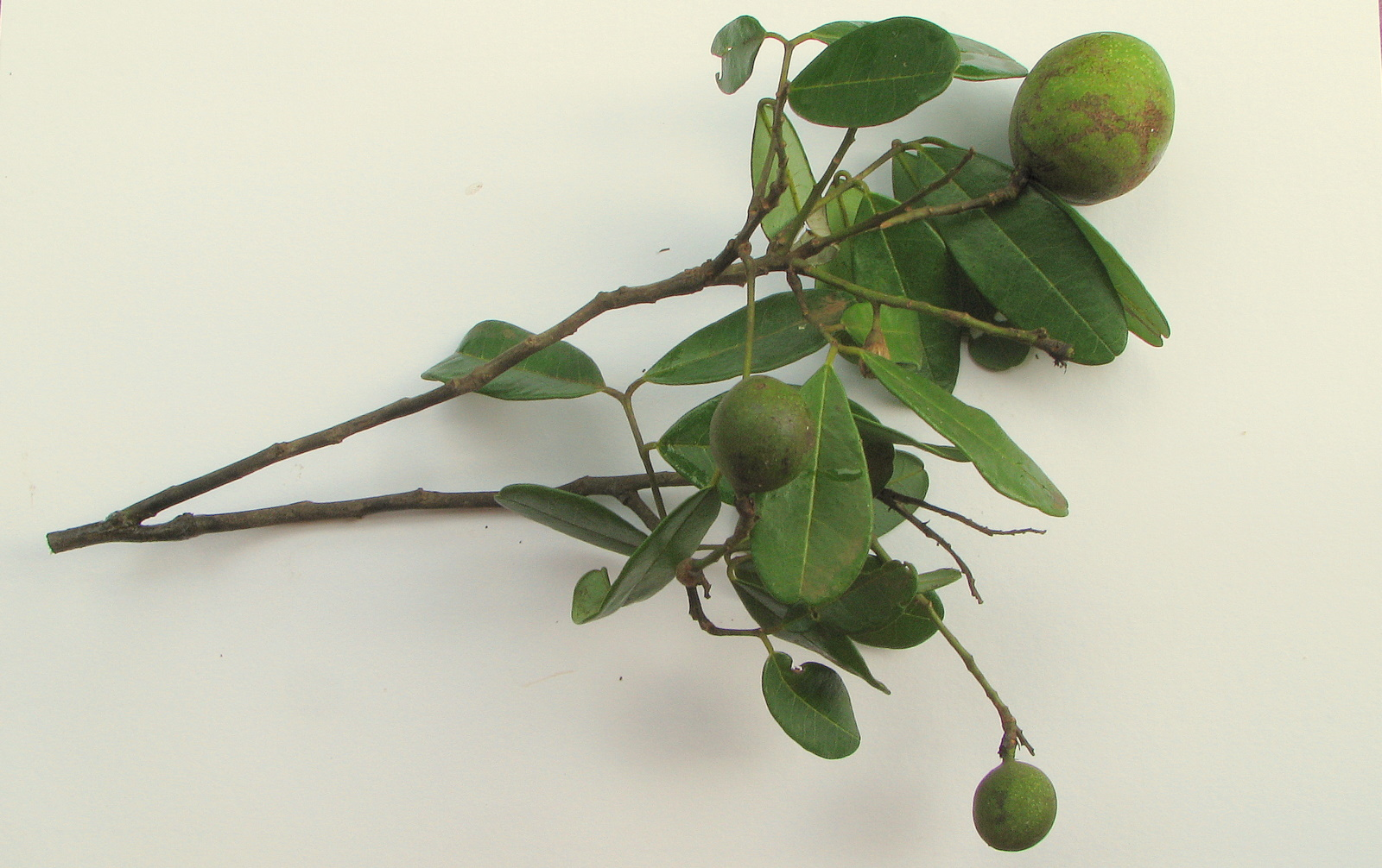 Andira marauensis, Bahia, Brazil